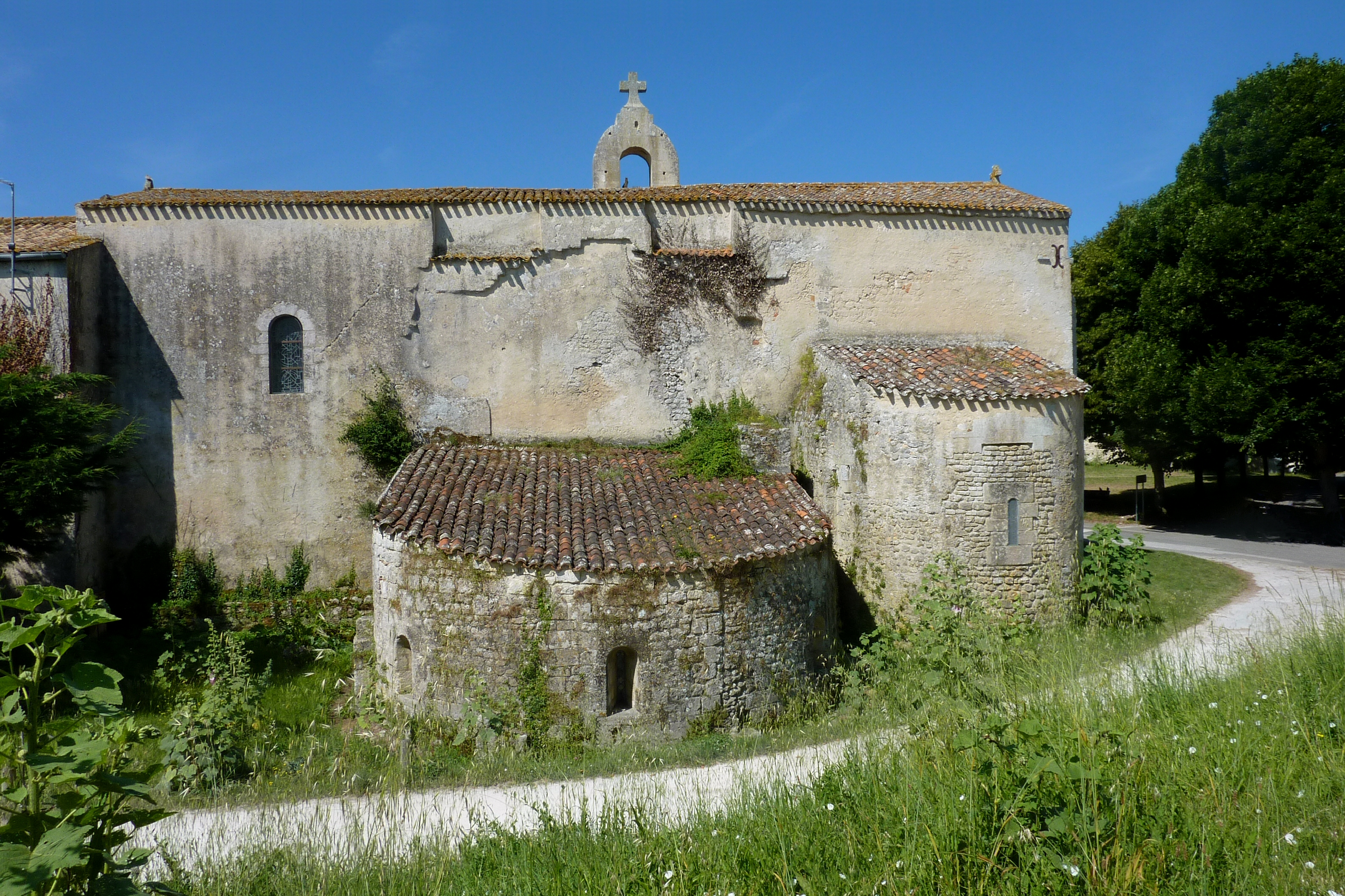 Église Saint-Martin Île d'Aix Charente-Maritime France .